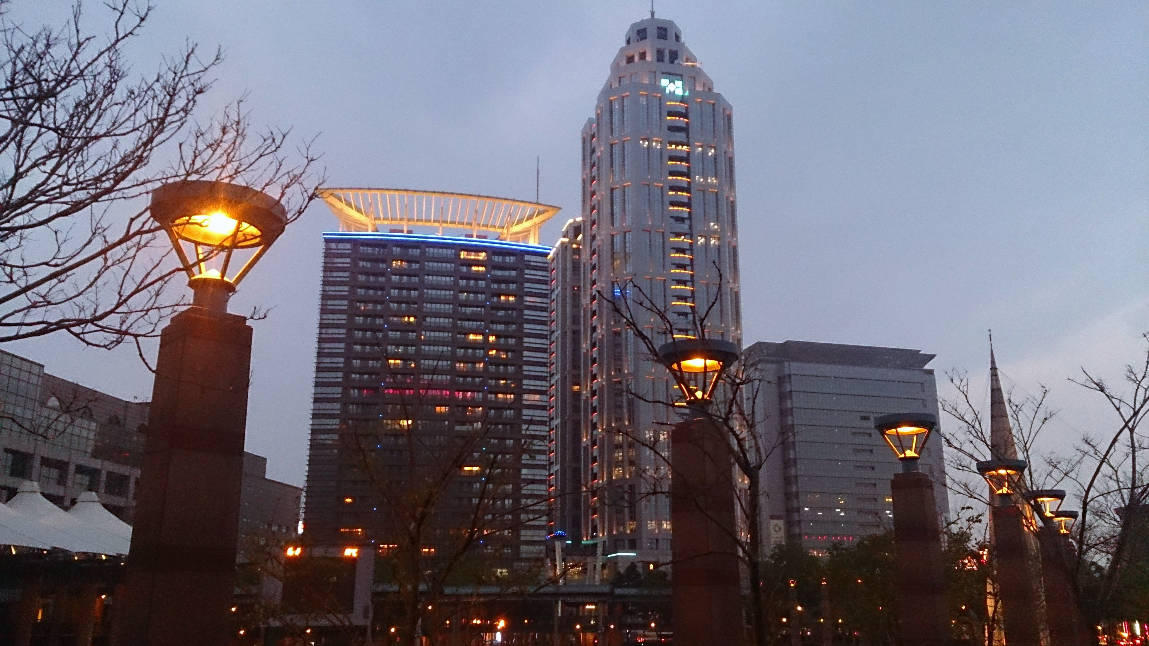 新板特區市民廣場一隅